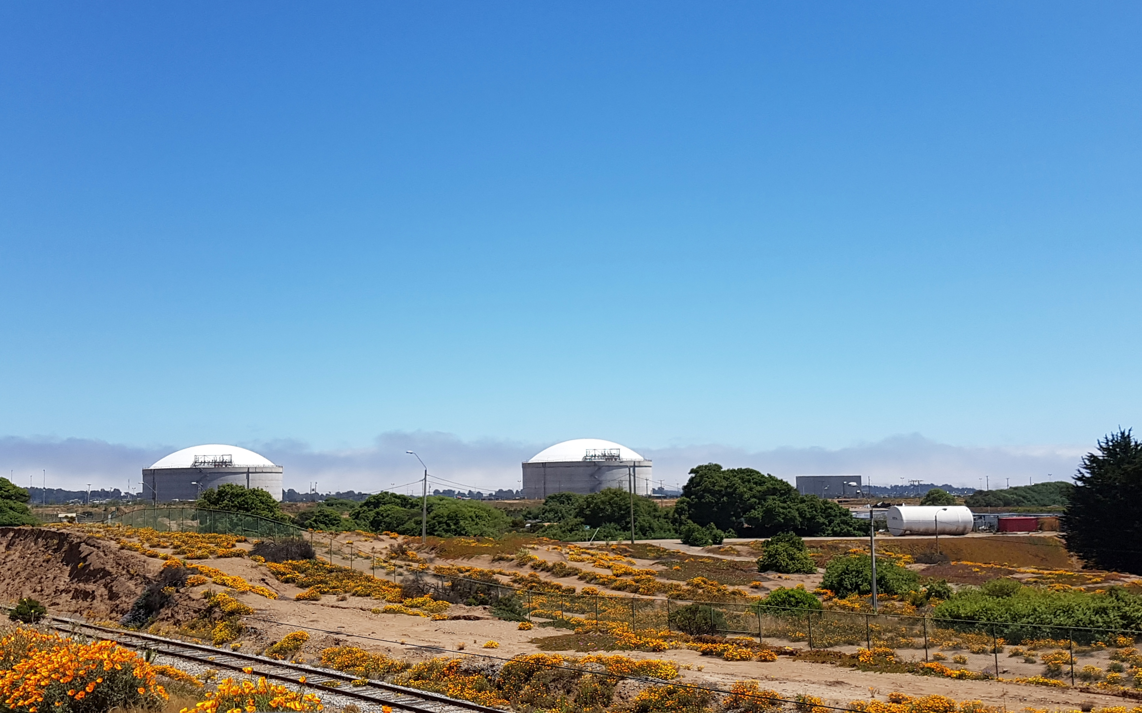 Refinería y fundición de La Ventanas, Codelco, región de Valparaíso, Chile.